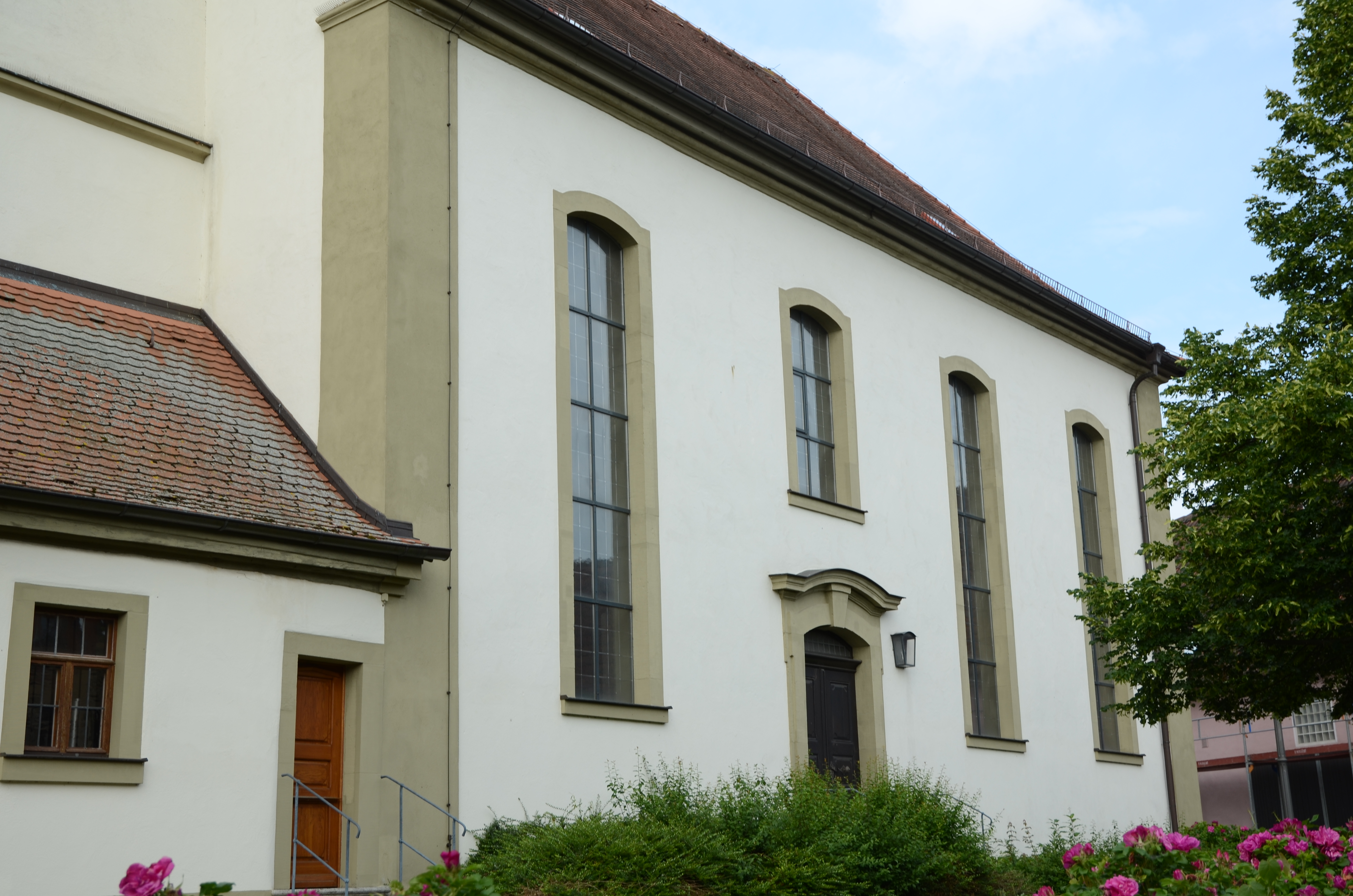 Sickershausen evang.-luth. Kirche St. Johannis